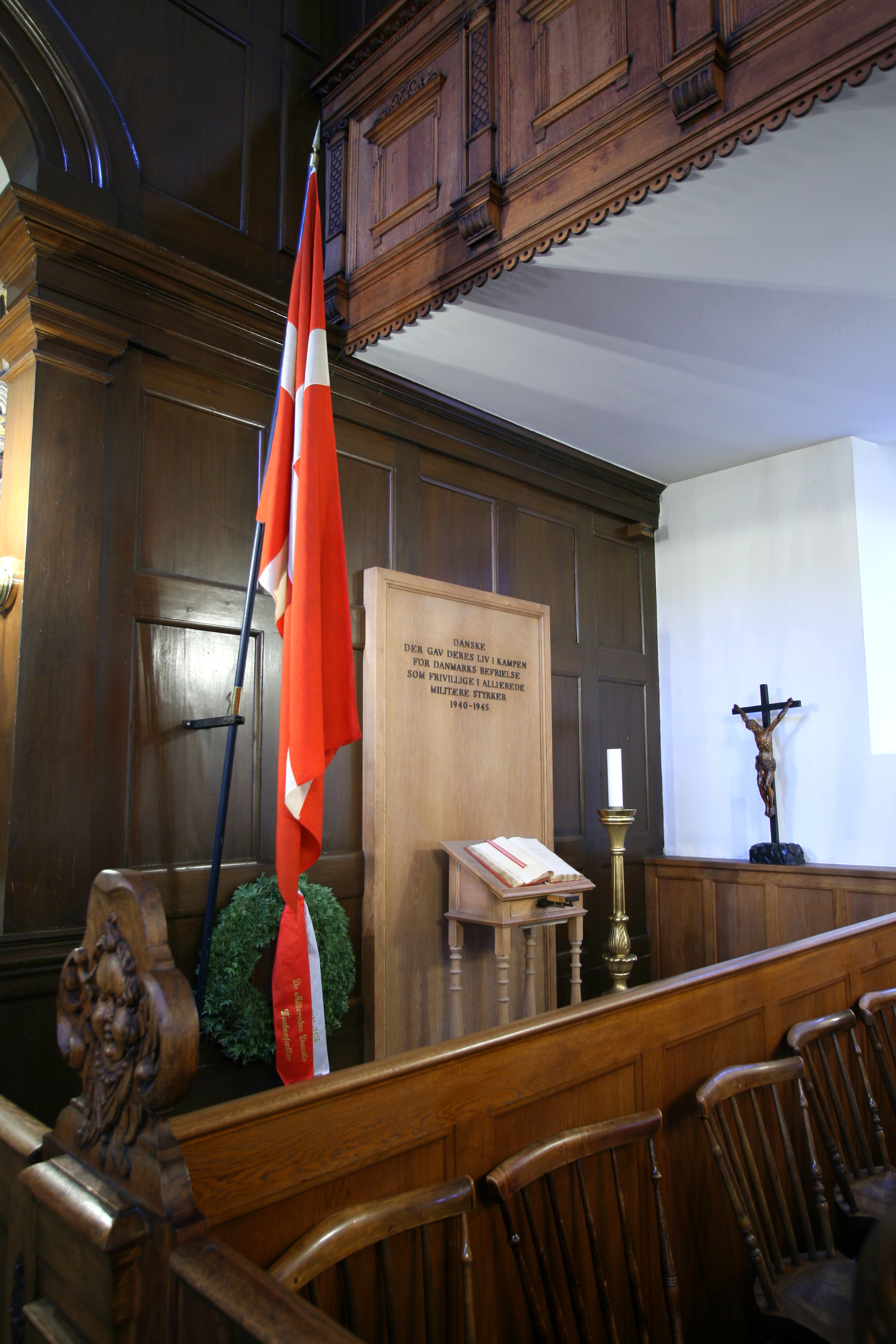 Holmens Kirke, Copenhagen, Denmark . Kirkefanen og mindekapel for faldne i 1940-45.